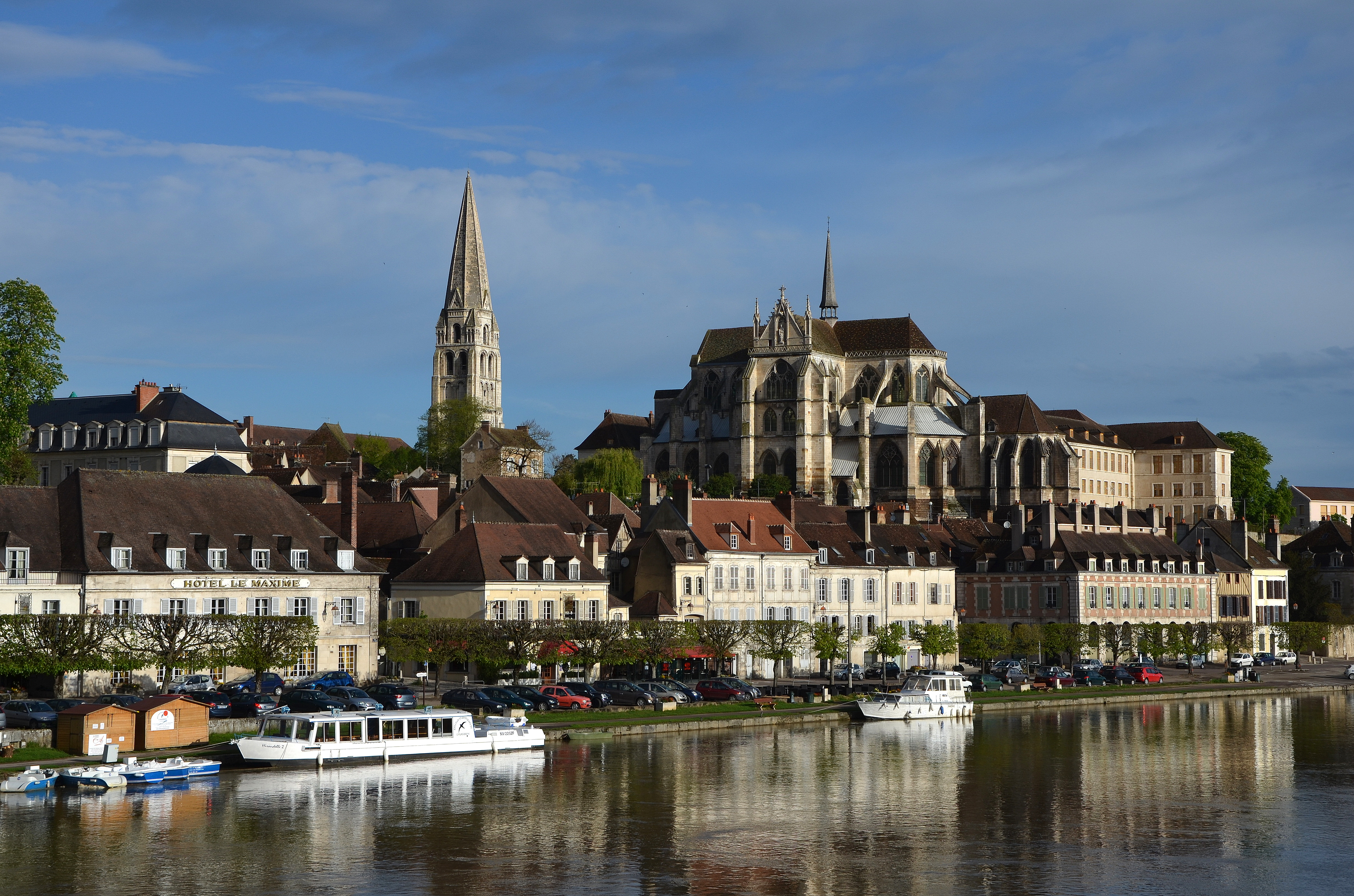 Eglise de l'abbaye St Germain à Auxerre, Yonne, France